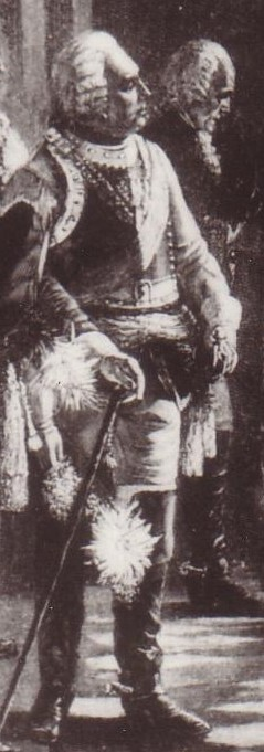 Generalleutnant Joachim Bernhard von Prittwitz am Totenbett Friedrichs d.Gr. (17.08.1786)